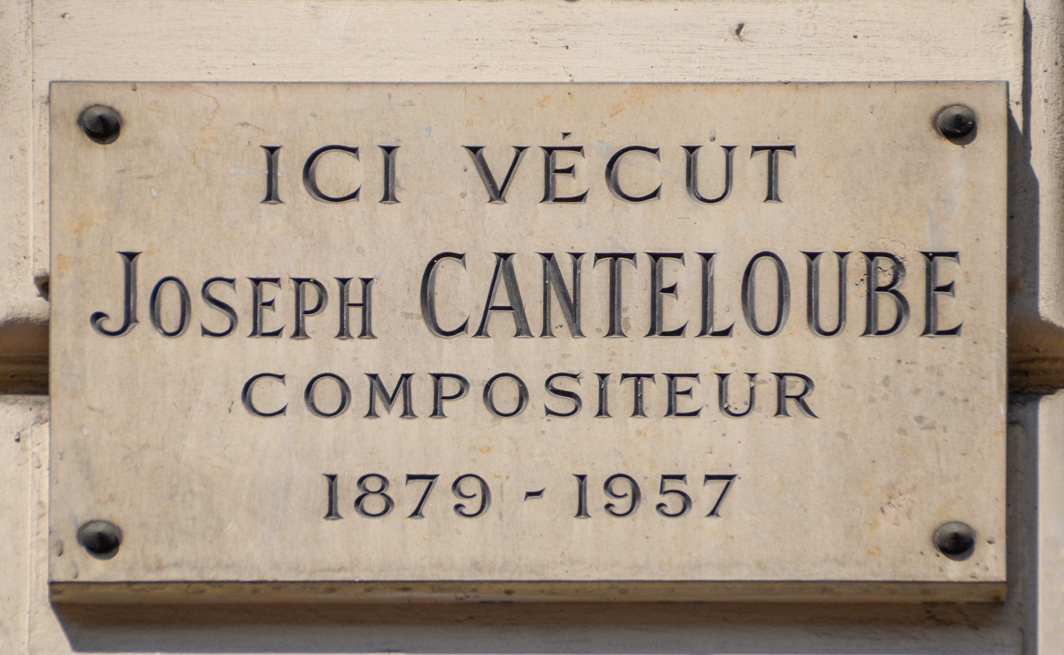 Joseph Canteloub plaque, 146 Rue de Rennes, 75006 Paris, France.